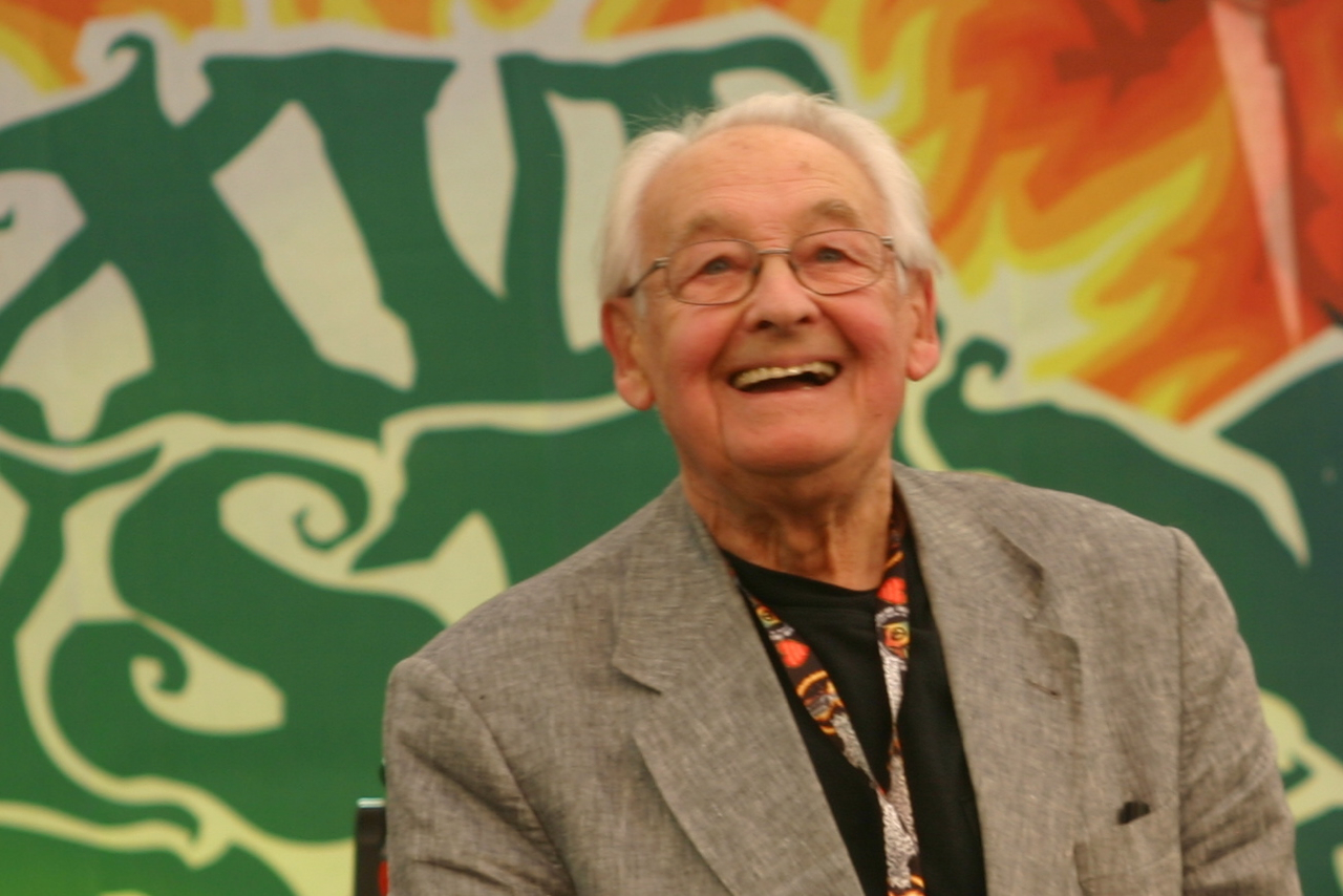 Andrzej Wajda auf der Haltestelle Woodstock 2010.